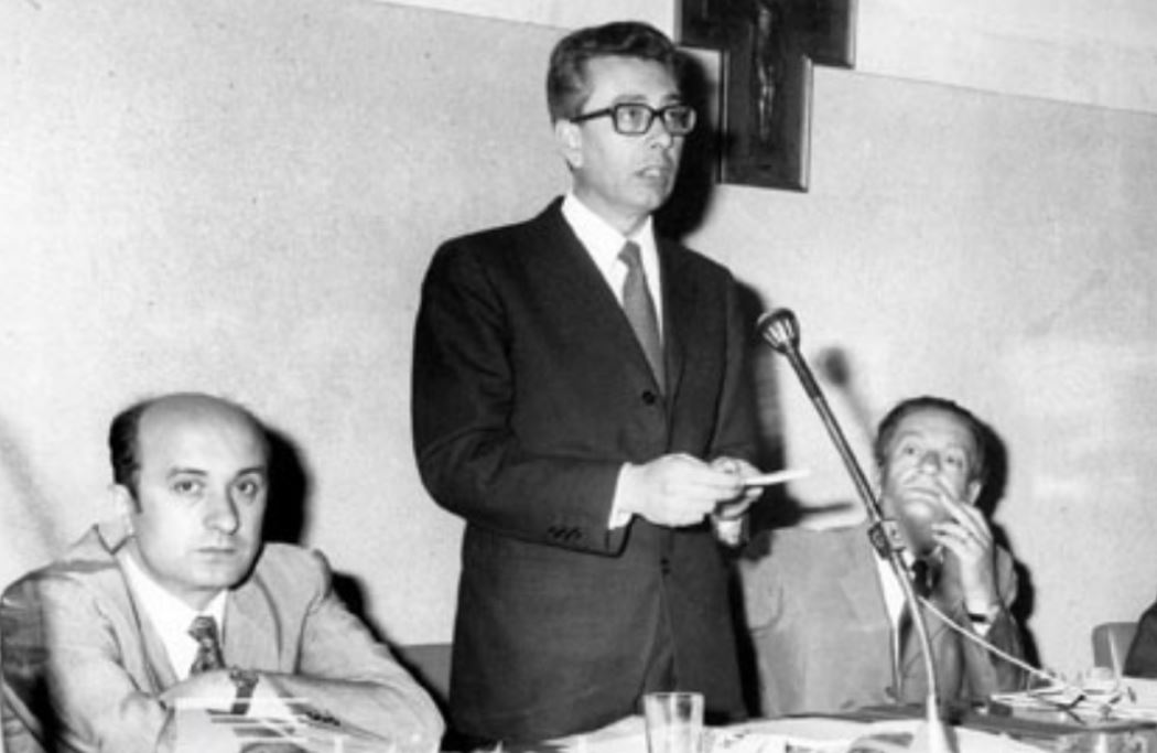 Arnaldo Forlani (in piedi) e Ciriaco De Mita, segretario e vice-segretario della DC, nel 1970 con Benigno Zaccagnini